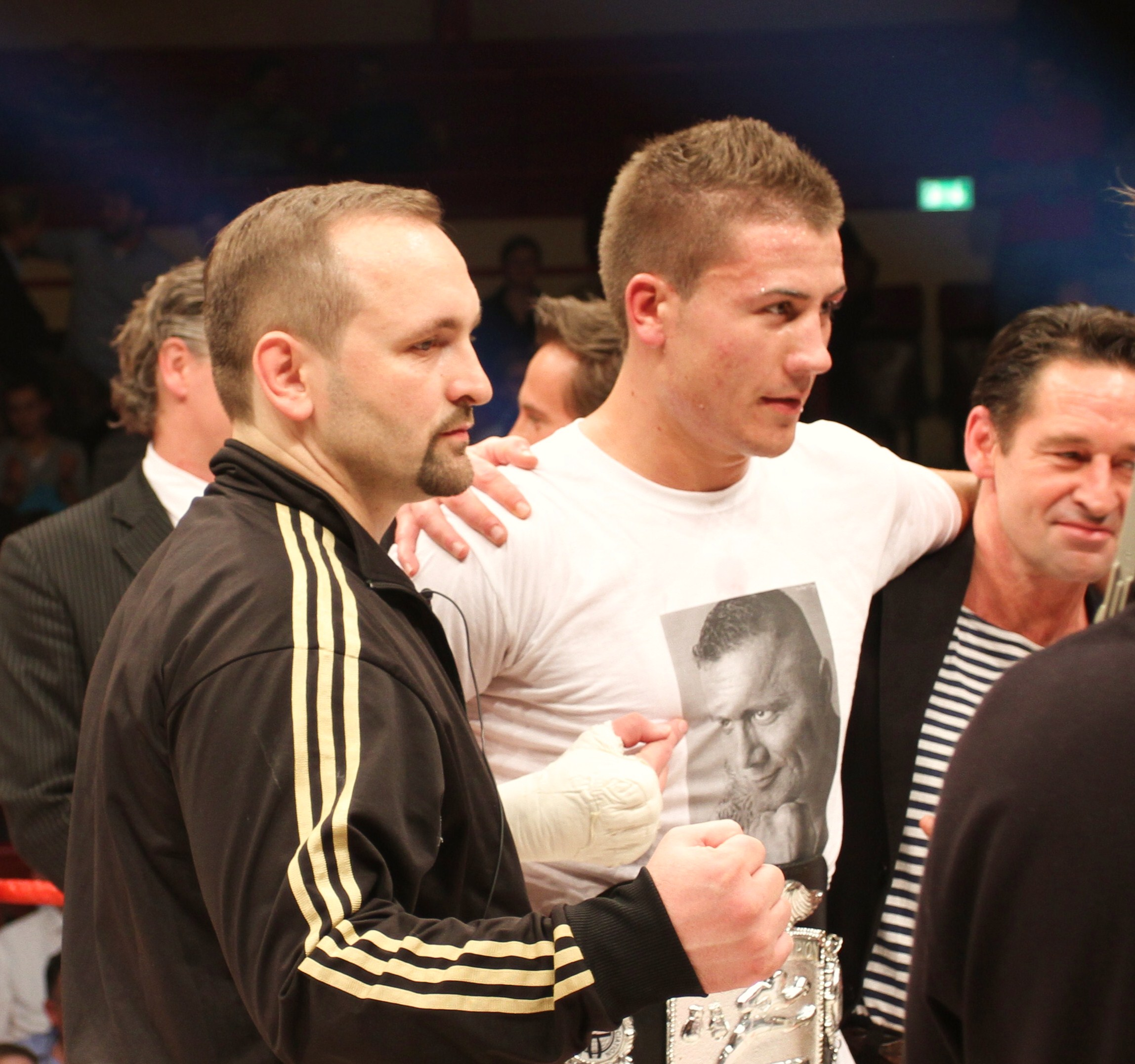 Pavlica Steko als Trainer von Florian "Faust" Pavic.